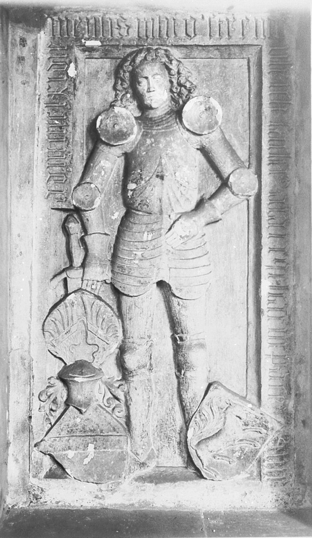 Grabplatte des Ritters Ulrich Sack († Juli 1461) im Kreuzgang des Erfurter Doms